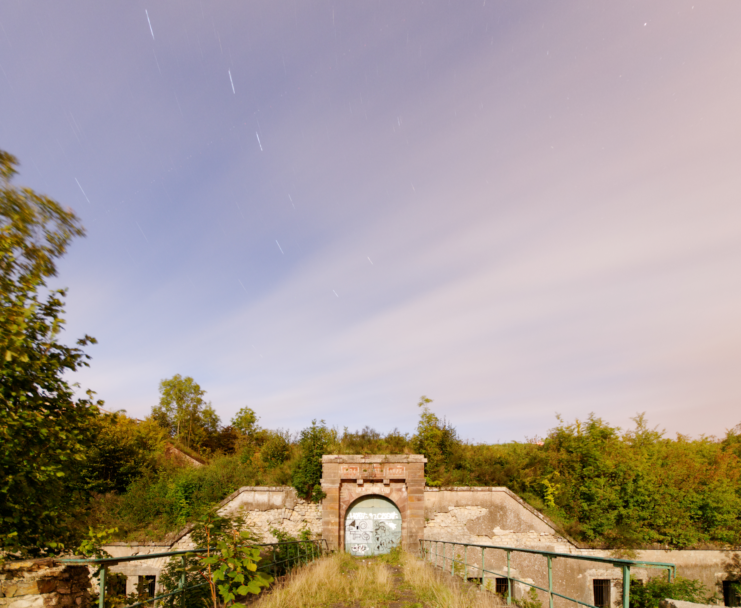 This photograph was taken with a Nikon D300 Entrée du fort du Salbert, pris en 10 minutes de pose, éclairé par le clair de Lune. Salbert hill fortifications.